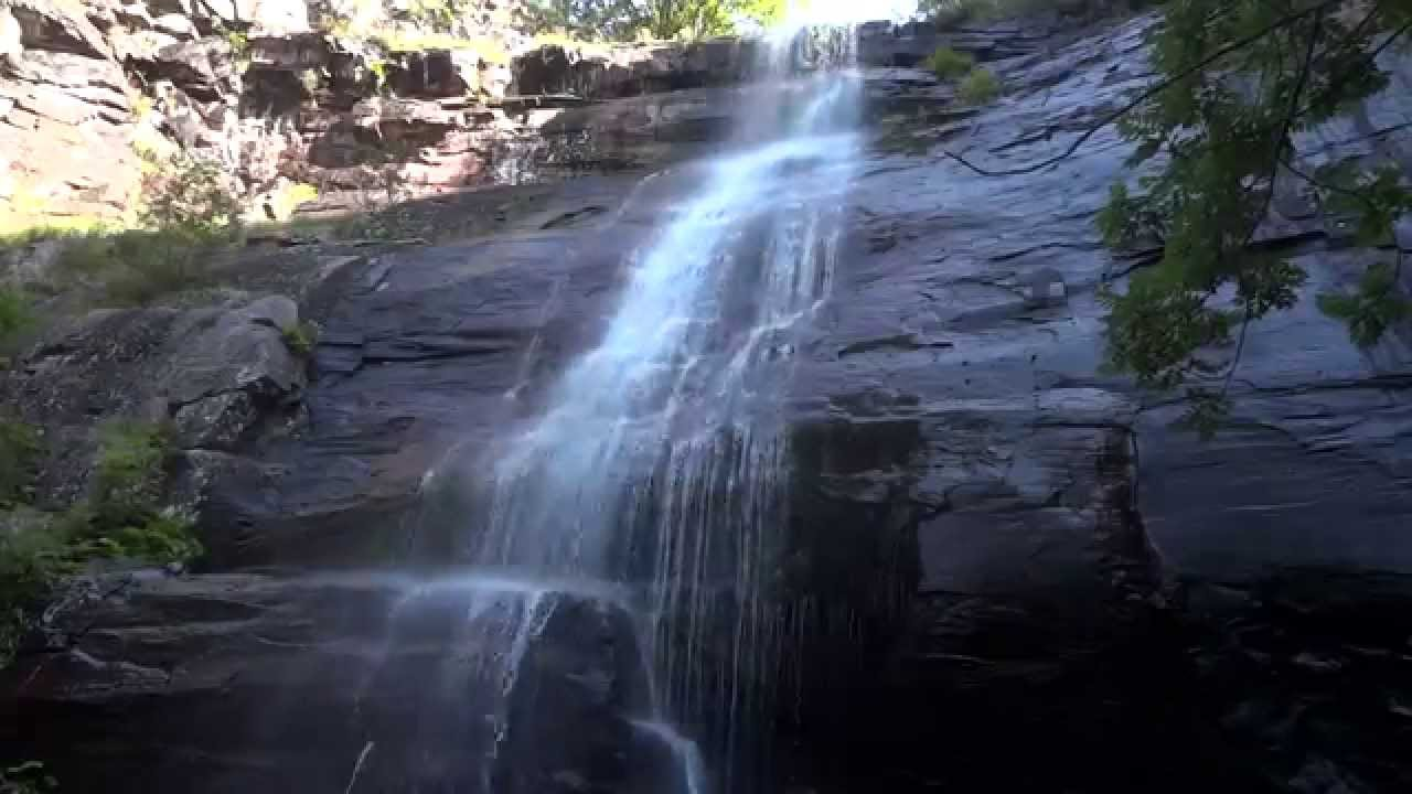 Српски (ћирилица): Чангуљански скок